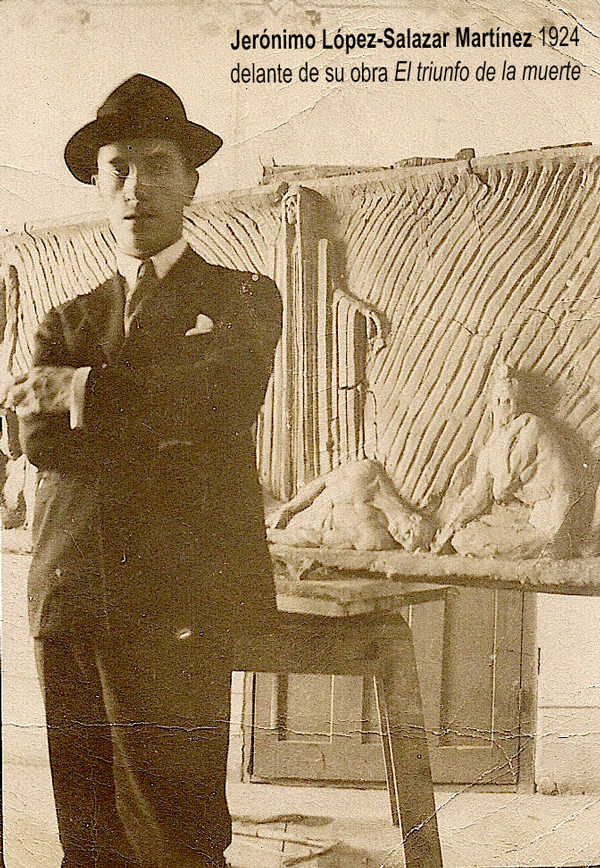 Jerónimo López-Salazar Martínez 1924 delante de su obra El triunfo de la muerte